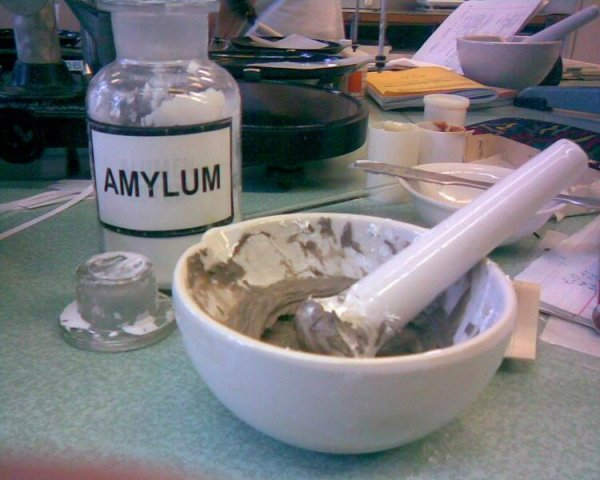 Технология мази, экстемпоральная рецептура